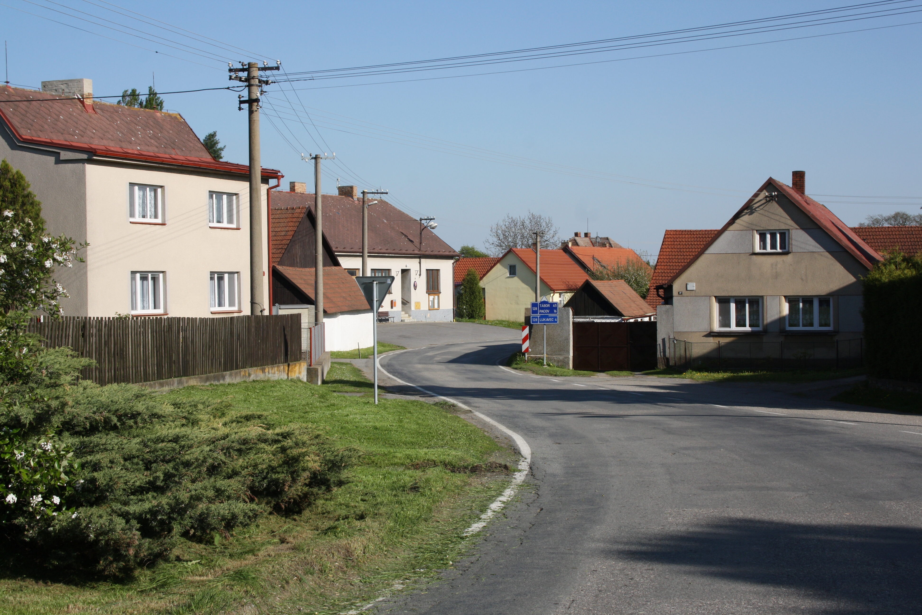 Čáslavsko - silnice 128, směr Lukavec (budova vzadu uprostřed je obecní úřad)